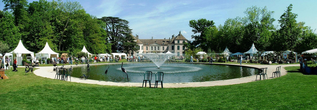 Coppet Castle